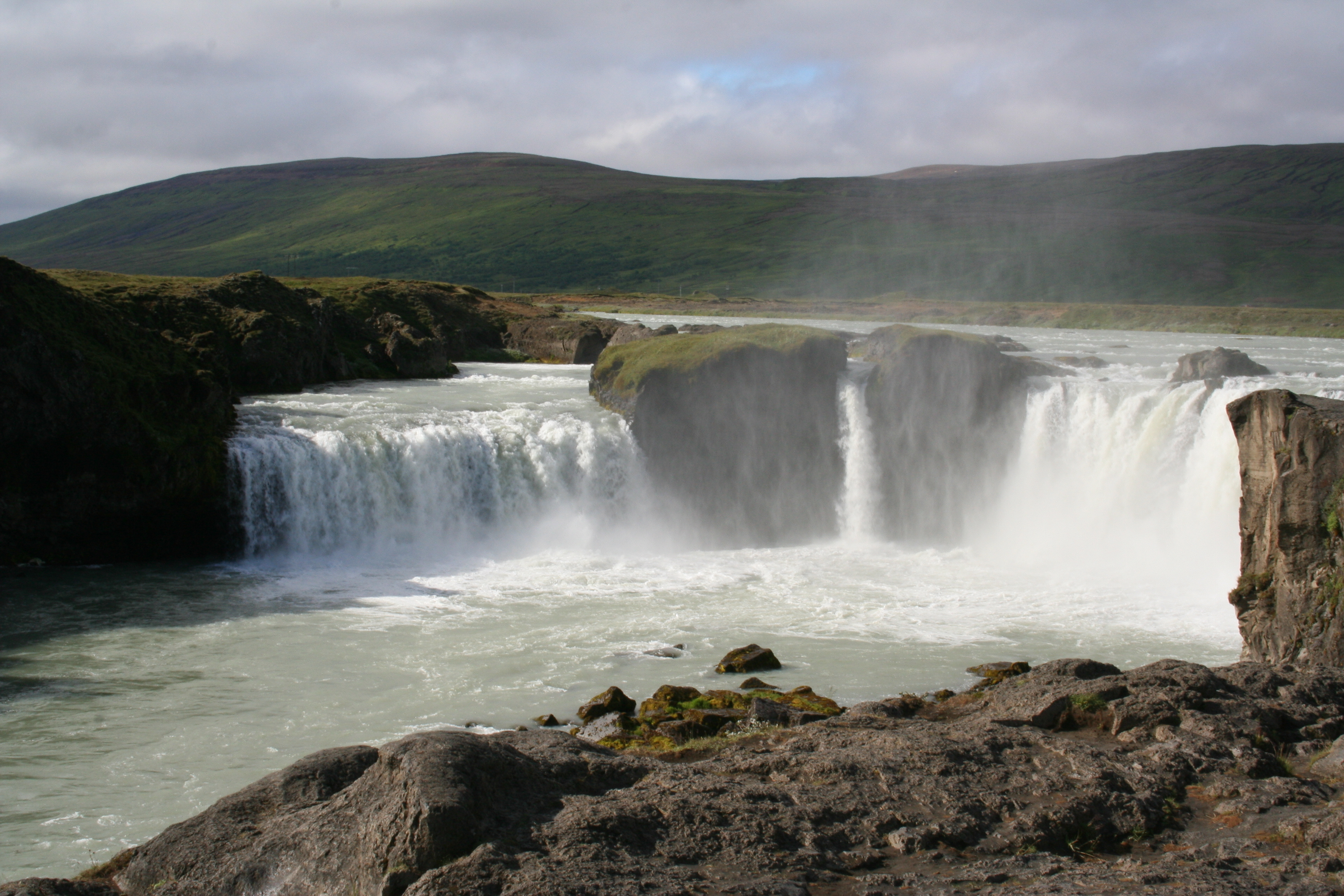 Godafoss